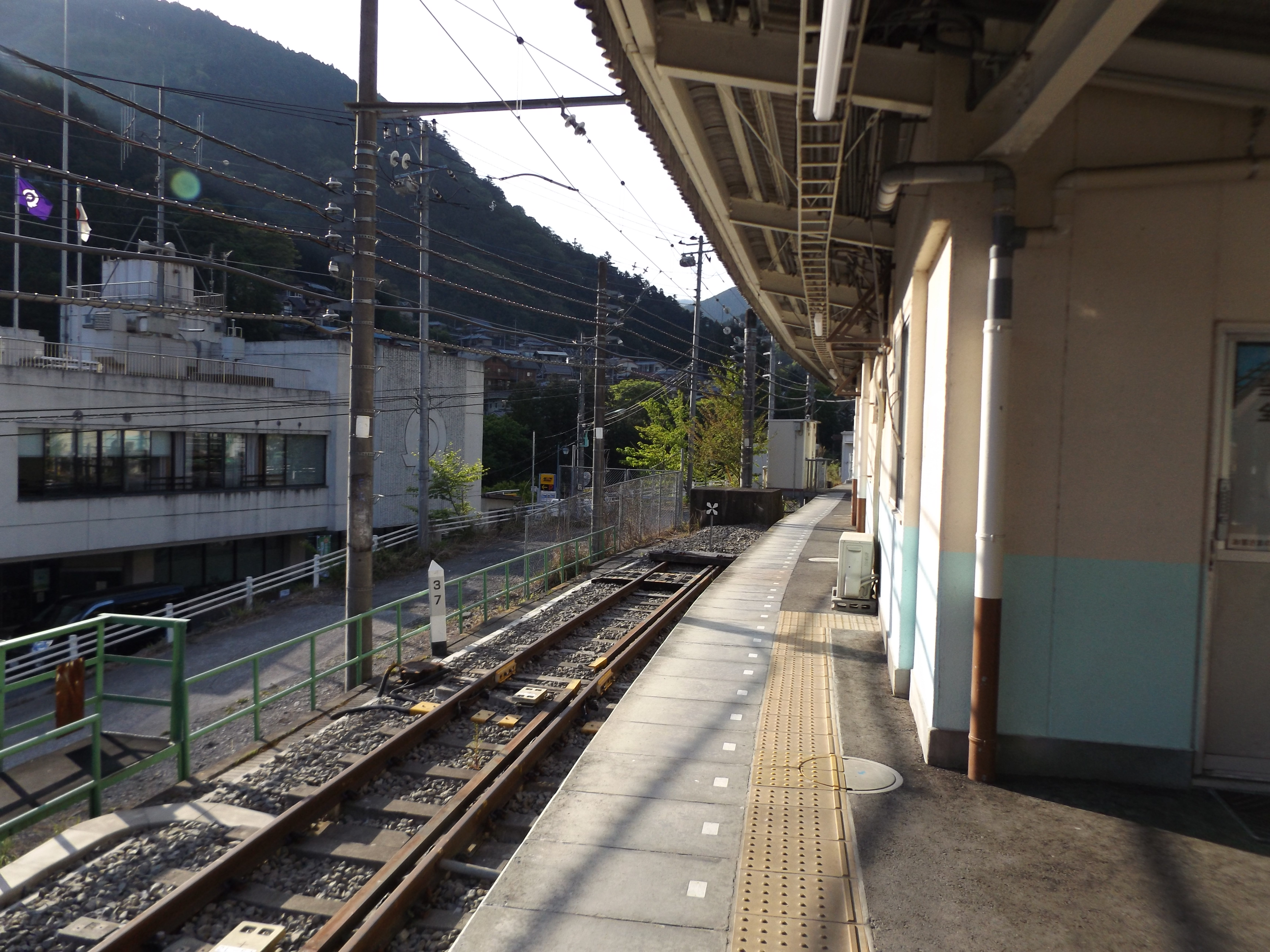 東京都西多摩郡奥多摩町にある東日本旅客鉄道（JR東日本）青梅線奥多摩駅1番線の線路終端部。